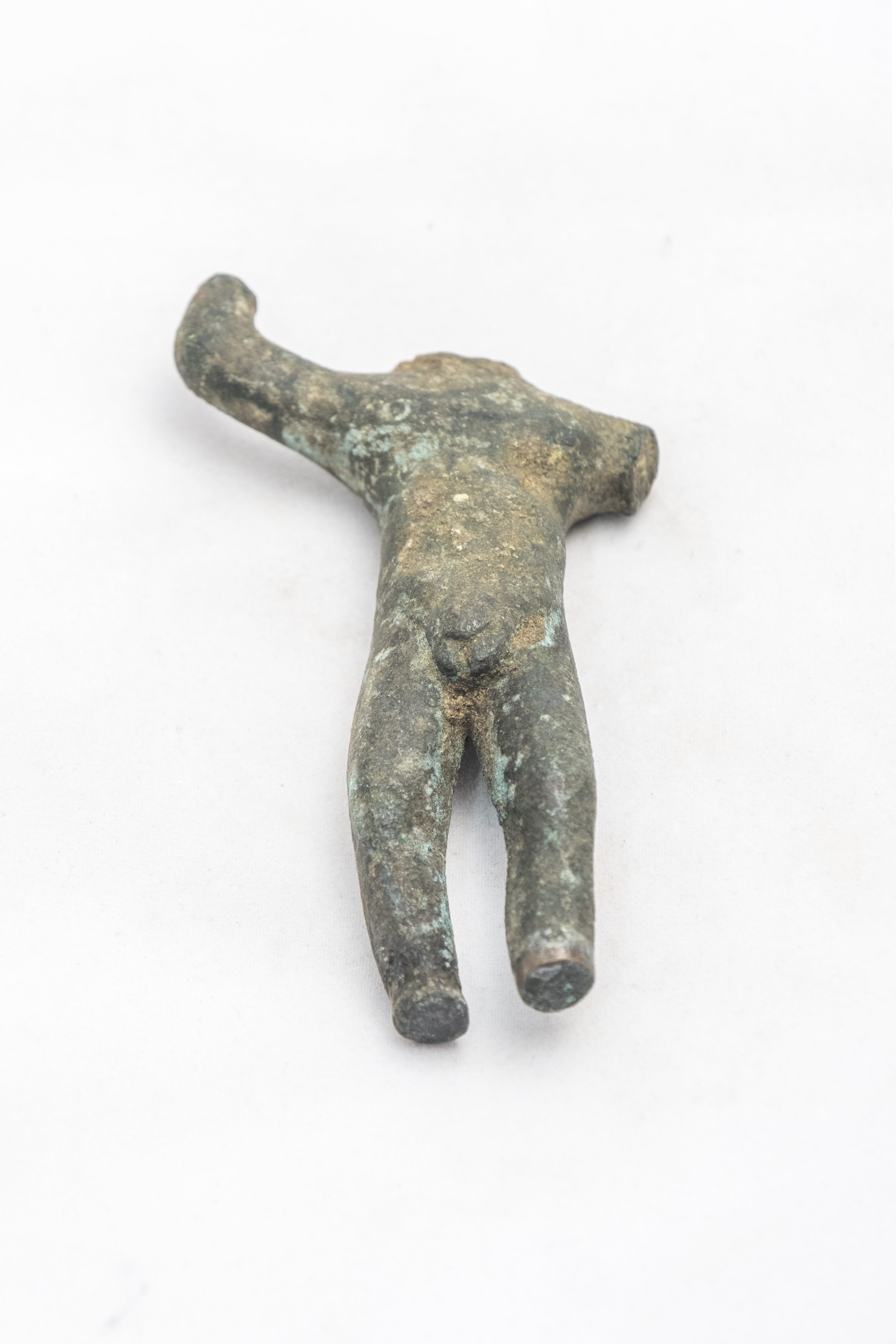 Figureta de Mars Balearicus de Binicalaf (Maó, Menorca). Museu de Menorca.